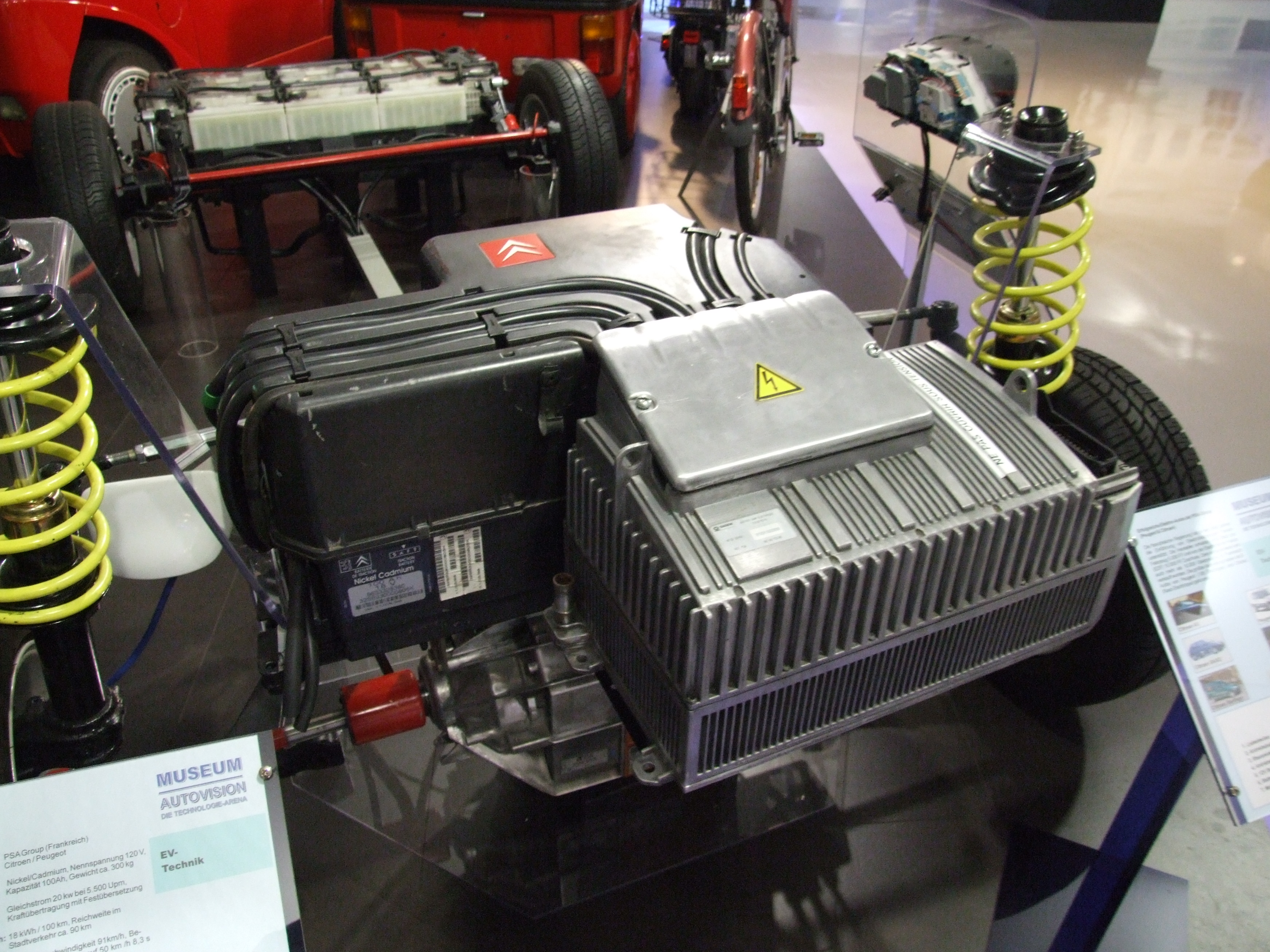 Elektroantrieb der PSA Group Citroen/Peugeot: 20 kW bei 5500 Umdrehungen/Minute Gleichstrommotor, 91 km/h, Kraftübertragung mit Festübersetzung, im Hintergrund Nickel-Cadmium-Akkumulator: Kapazität 100 Ah, 120 Volt, 300 kg; Bordladegerät max. 3 kW entspricht Zugewinn 15 km Reichweite je Stunde; für Peugeot 106 Electrique, Citroen Saxo Electrique (die beiden meistverkauften), Citroen AX Electrique und die Transporter Citroen Belingo Electrique und Peugeot Partner Electrique, insgesamt über 10.000 Exemplare, bis zum Verbot der Nickel-Cadmium-Batterie, die sehr langlebig und kältefest ist. Aufgenommen im Museum Autovision, Altlußheim